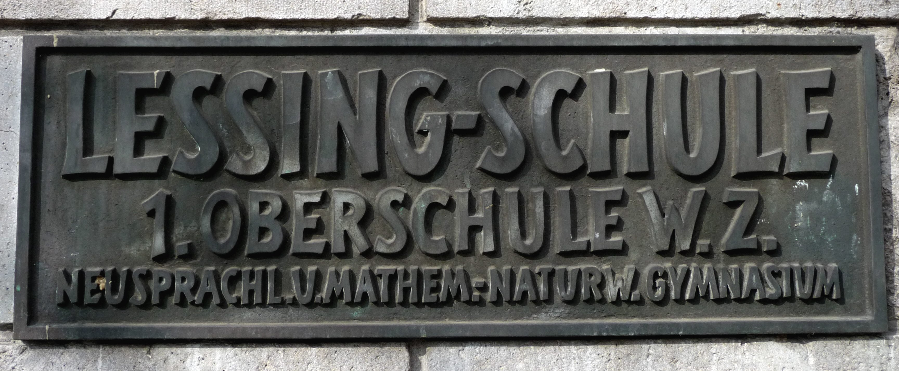 Lessing-Gymnasium in Berlin-Mitte, Eingangsschild